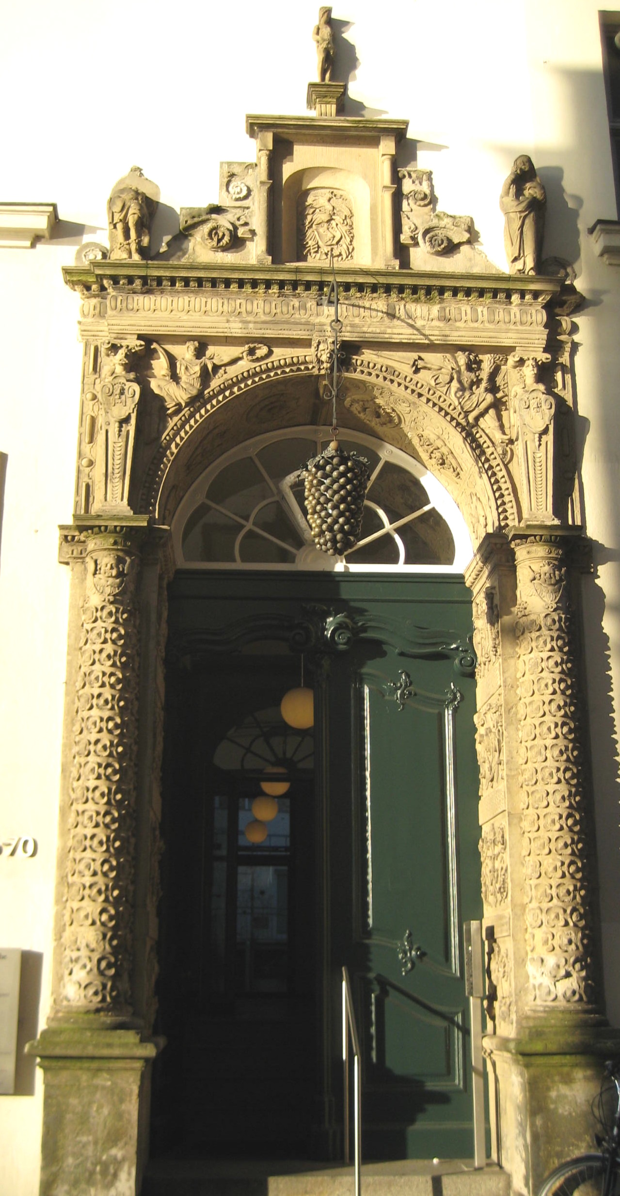 Portal des ehemaligen Gebäudes der Weinhandlung Carl Tesdorpf in der Lübecker Mengstraße